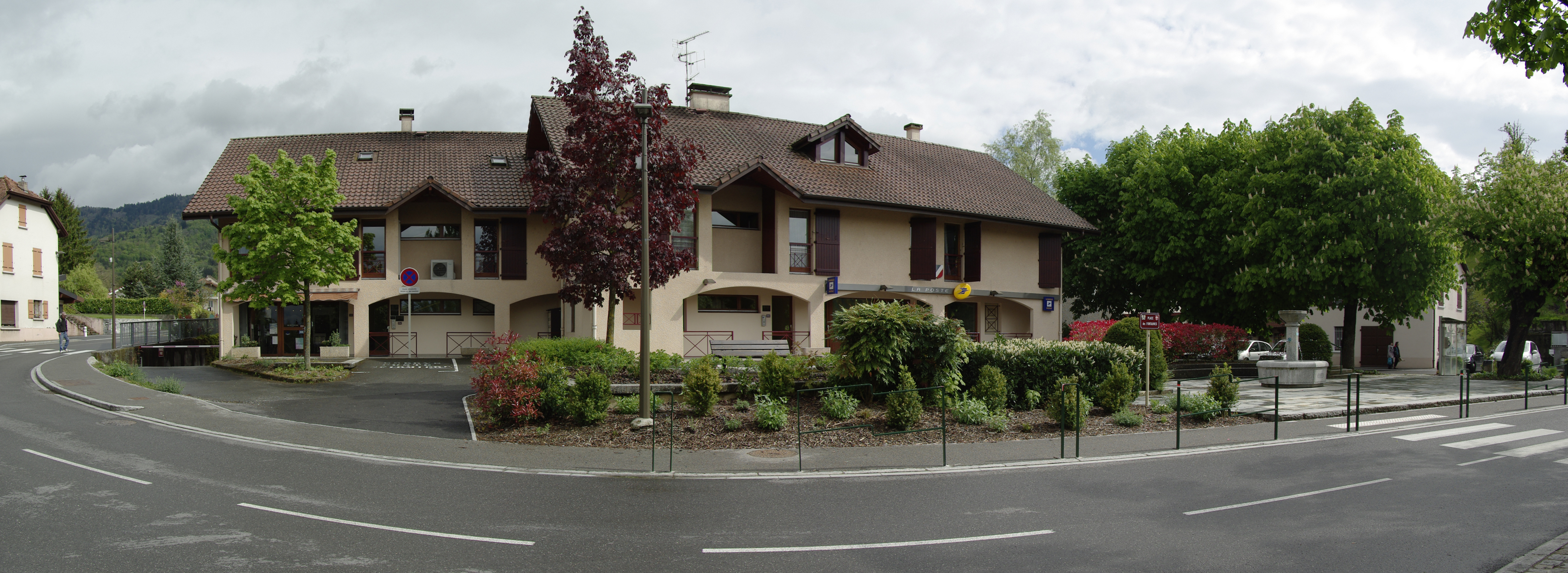 Place centrale de Perrignier